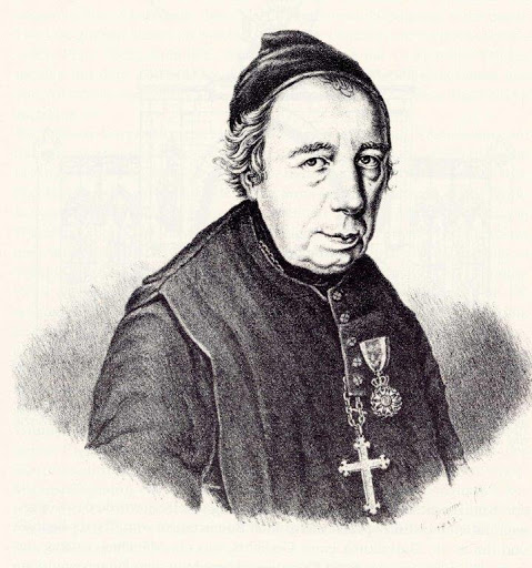 Portrait des letzten Abts des Klosters Kaisheim - Cölestin Königsdorfer